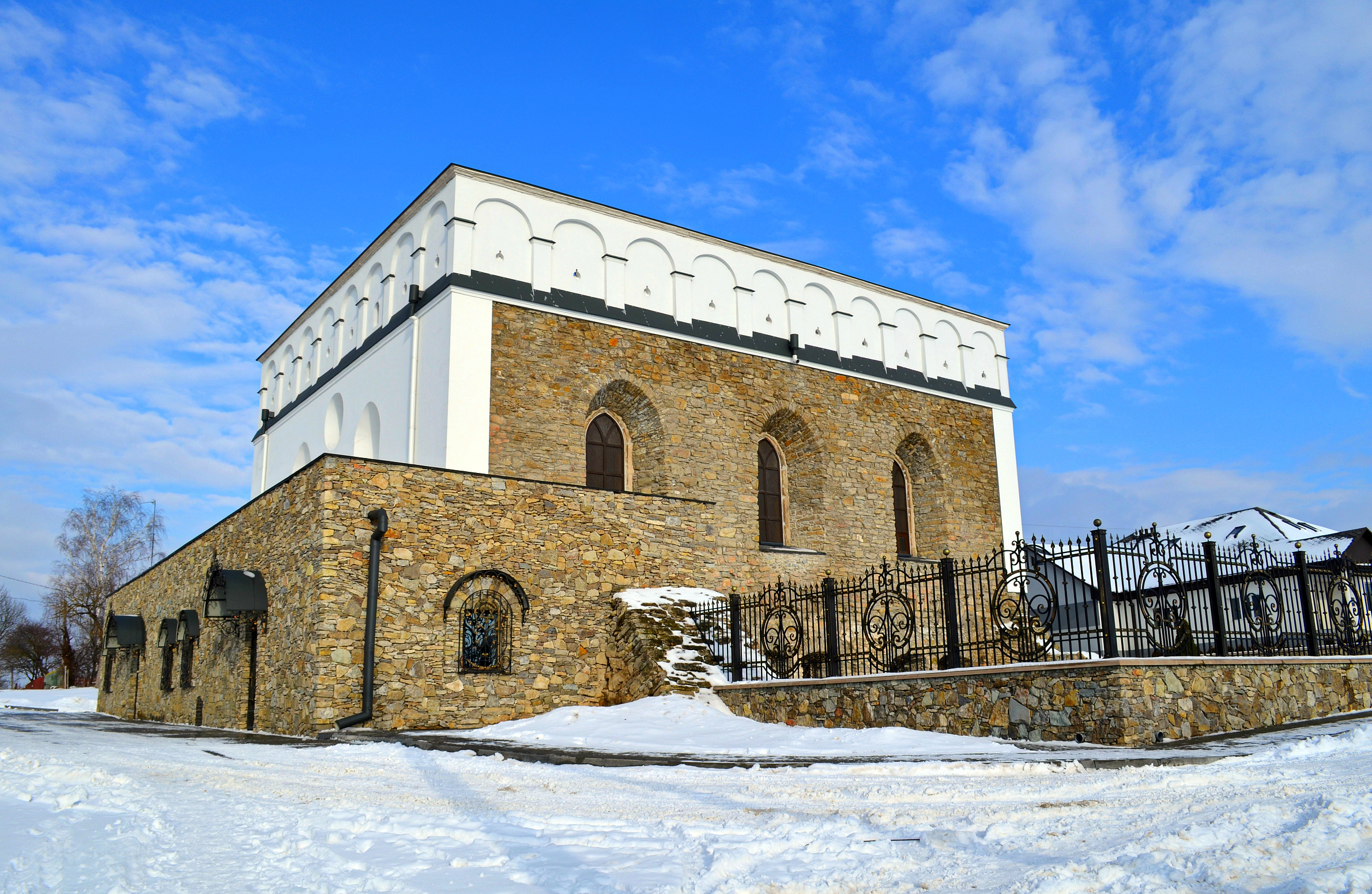 Синагога (Сатанів)